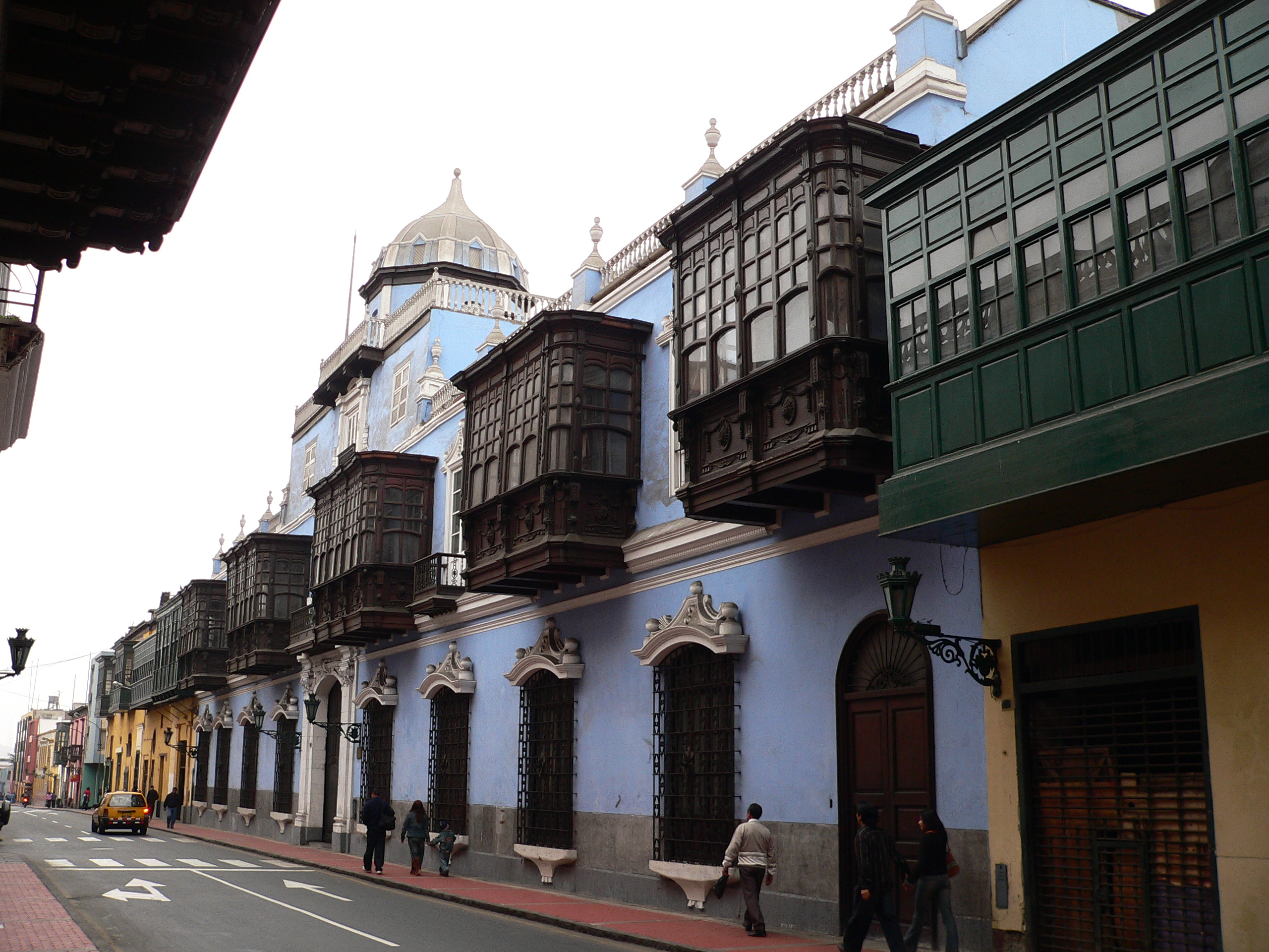 Descripción: Casa de Osambela Lugar: Centro Histórico de Lima Distrito : Cercado de Lima Ciudad : Lima País : Perú Fotógrafo: © Manuel González Olaechea y Franco Fecha de la foto : 8 de julio de 2007